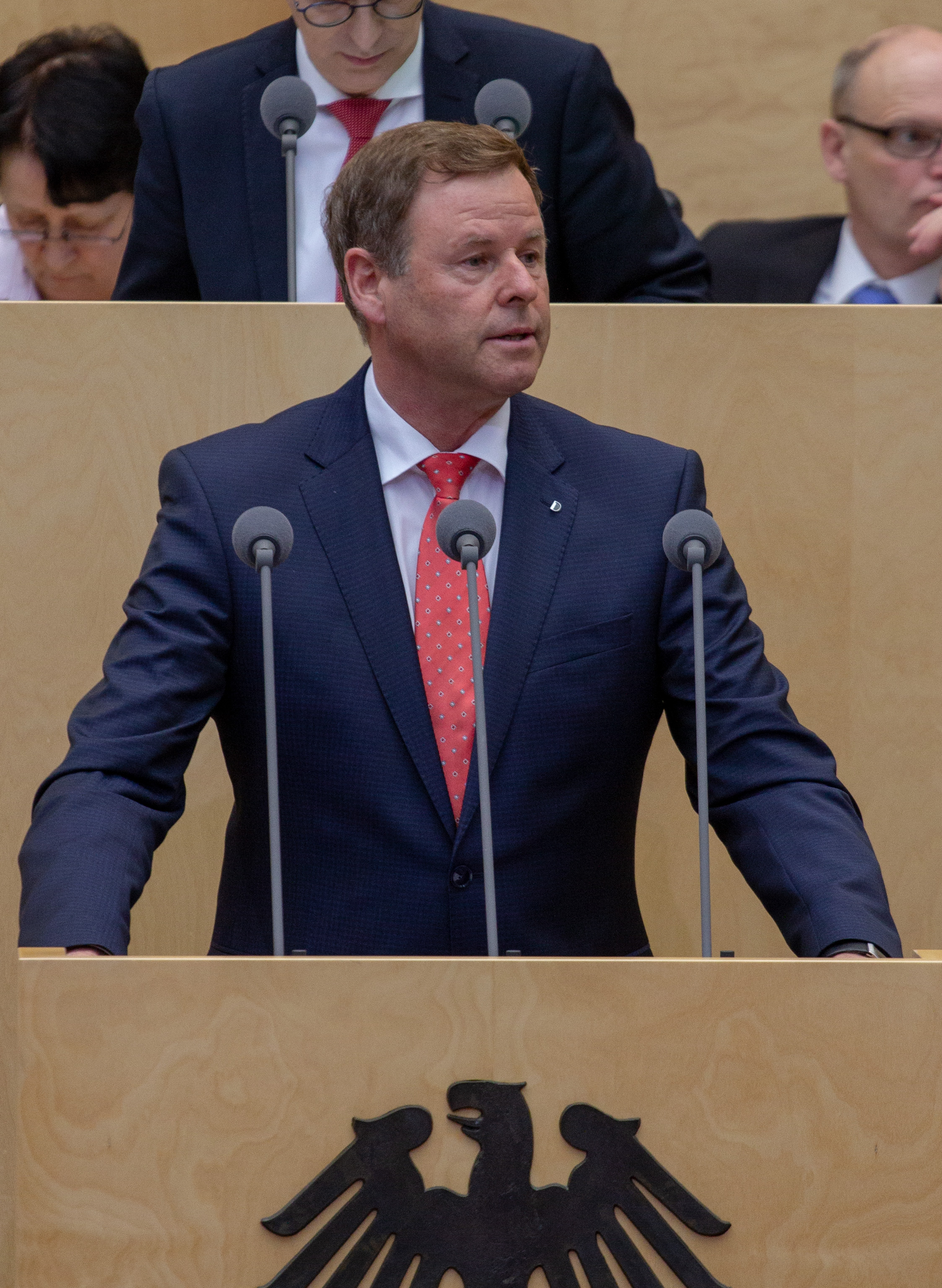 Plenarsitzung des Bundesrates am 12. April 2019 in Berlin.